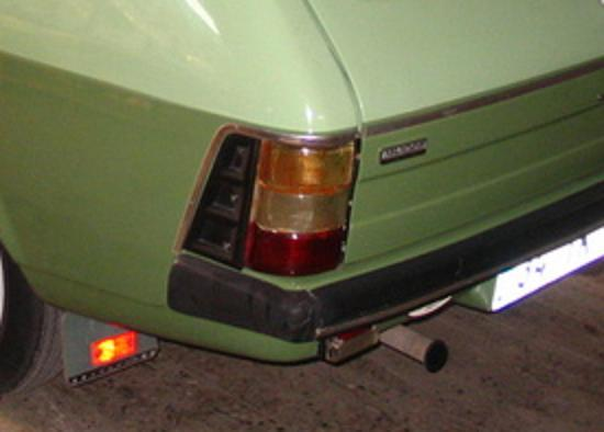 Türkiye'de seri olarak üretilen ilk otomobil markası Anadol'dan bir görünüm.